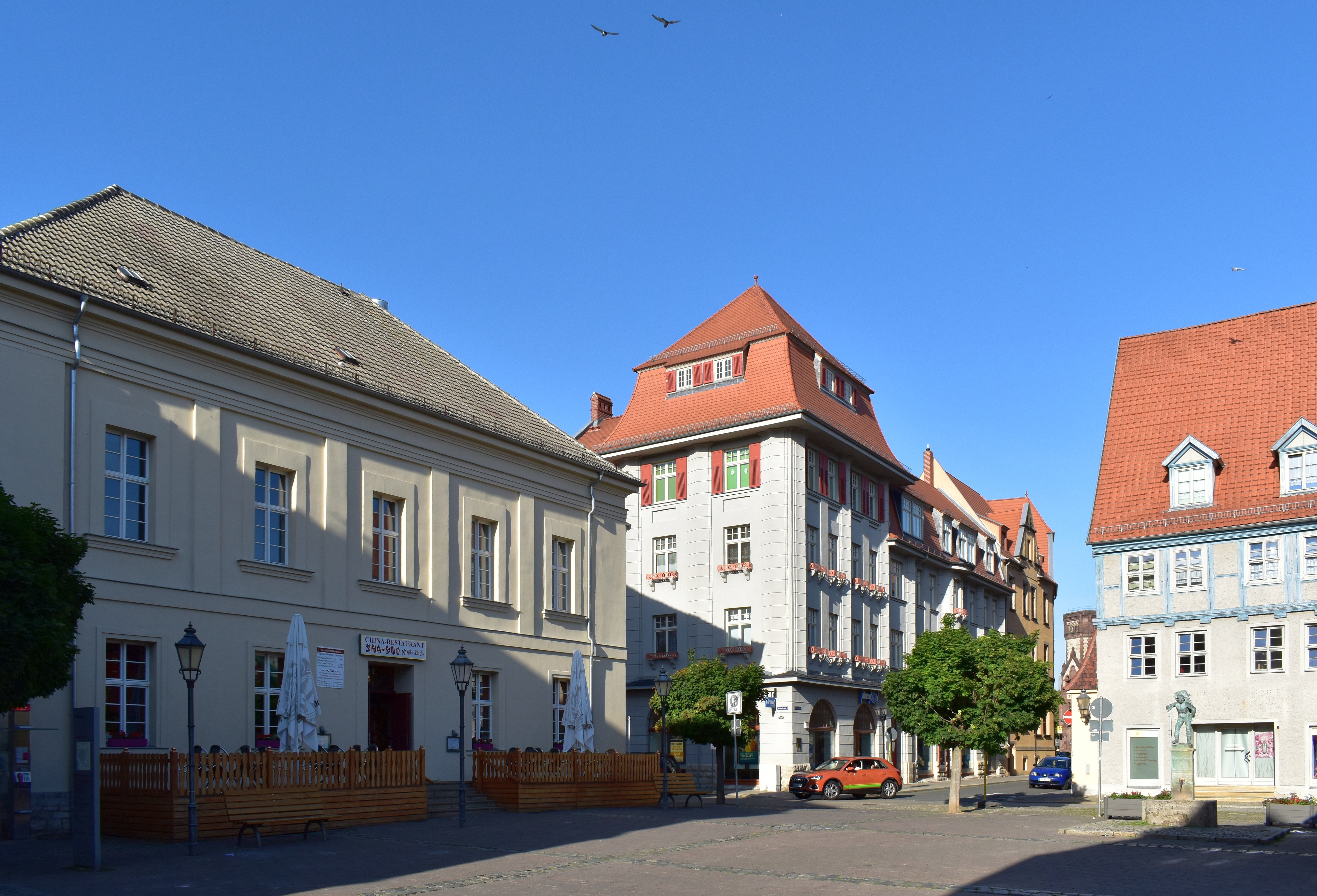 Bebauung Holzmarkt in Aschersleben